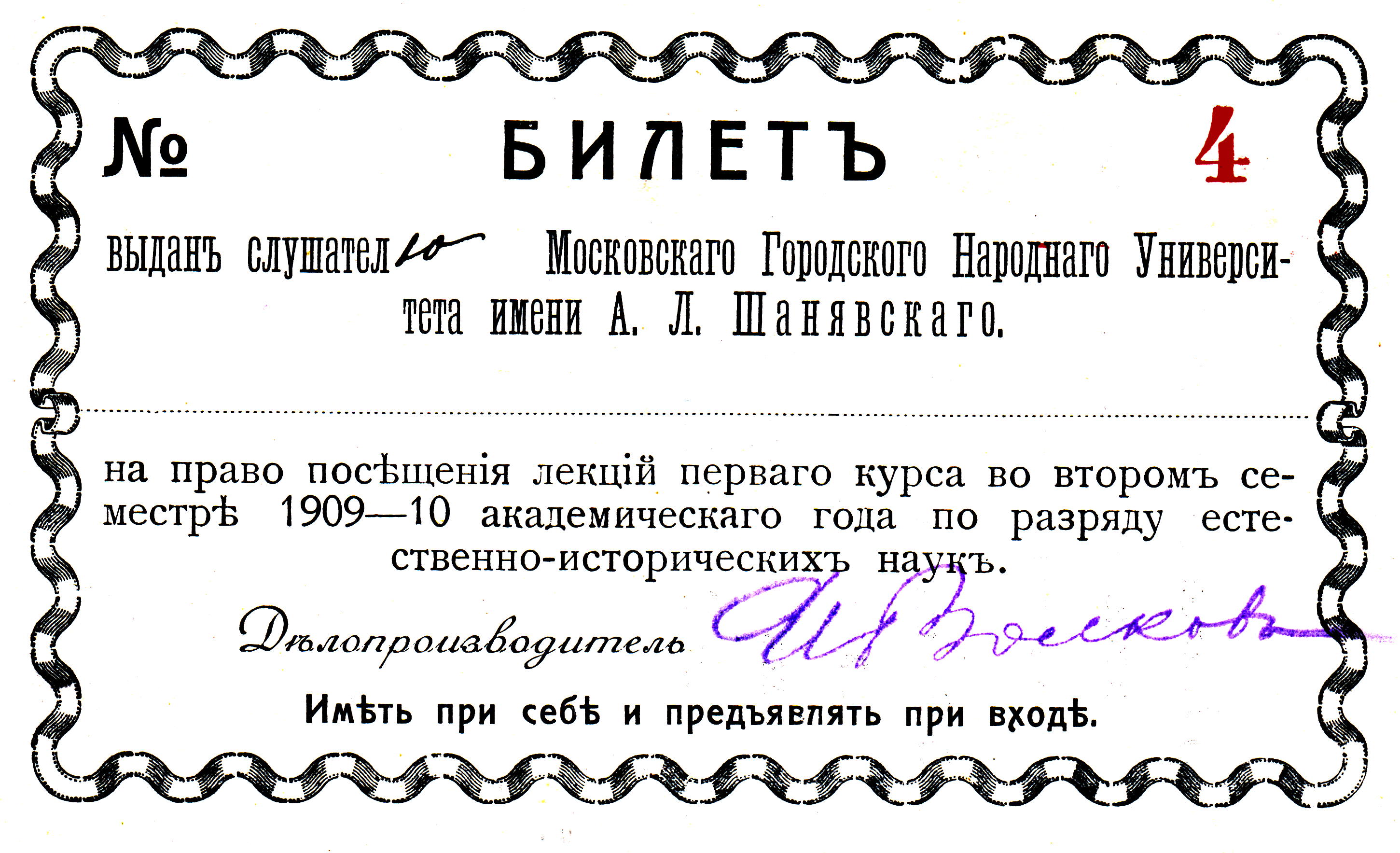 Студенческий билет Московского городского народного университета имени А. Л. Шанявского